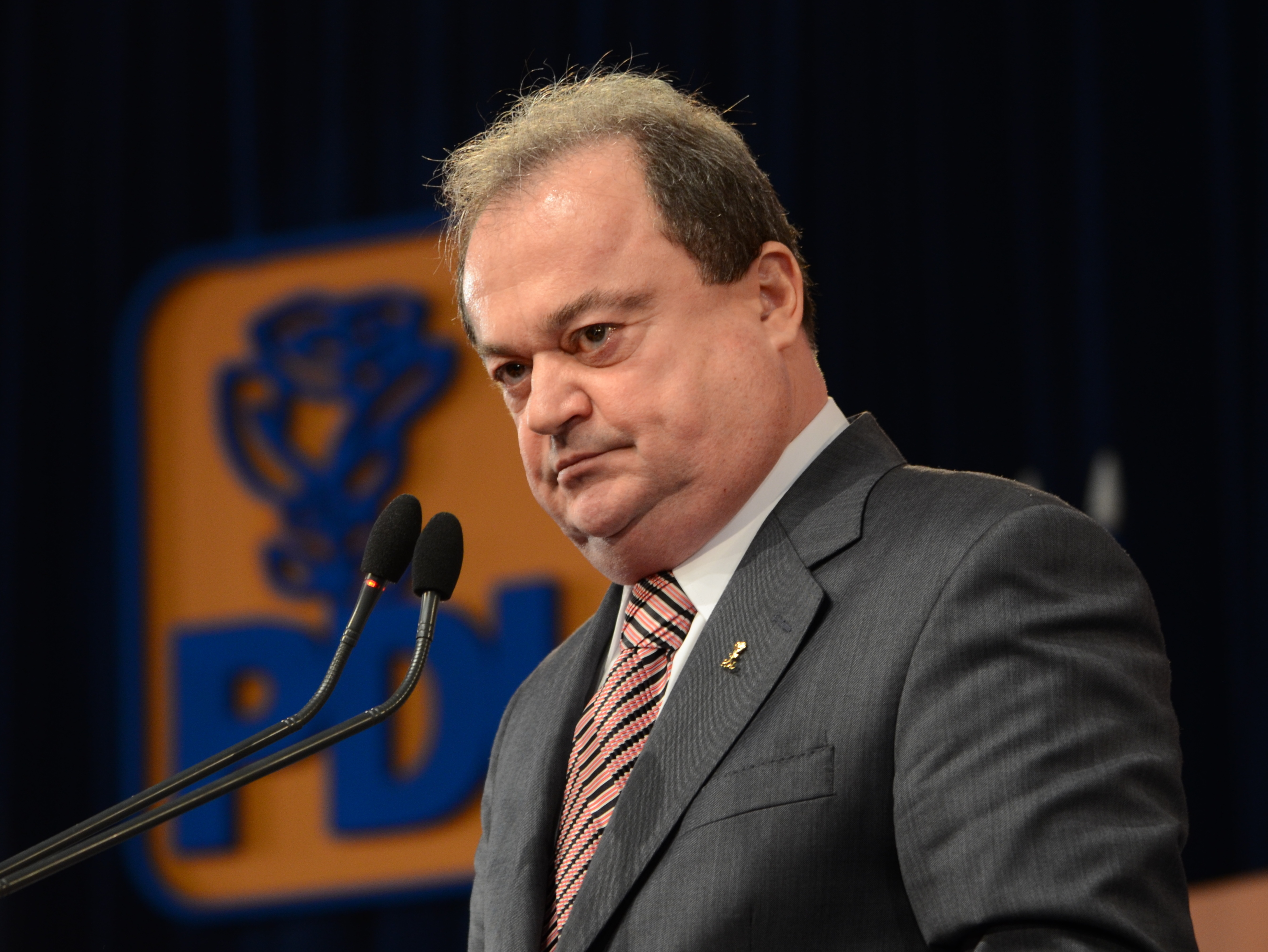 Vasile Blaga (la Convenția națională extraordinară a Partidului Democrat-Liberal, 23 martie 2013)